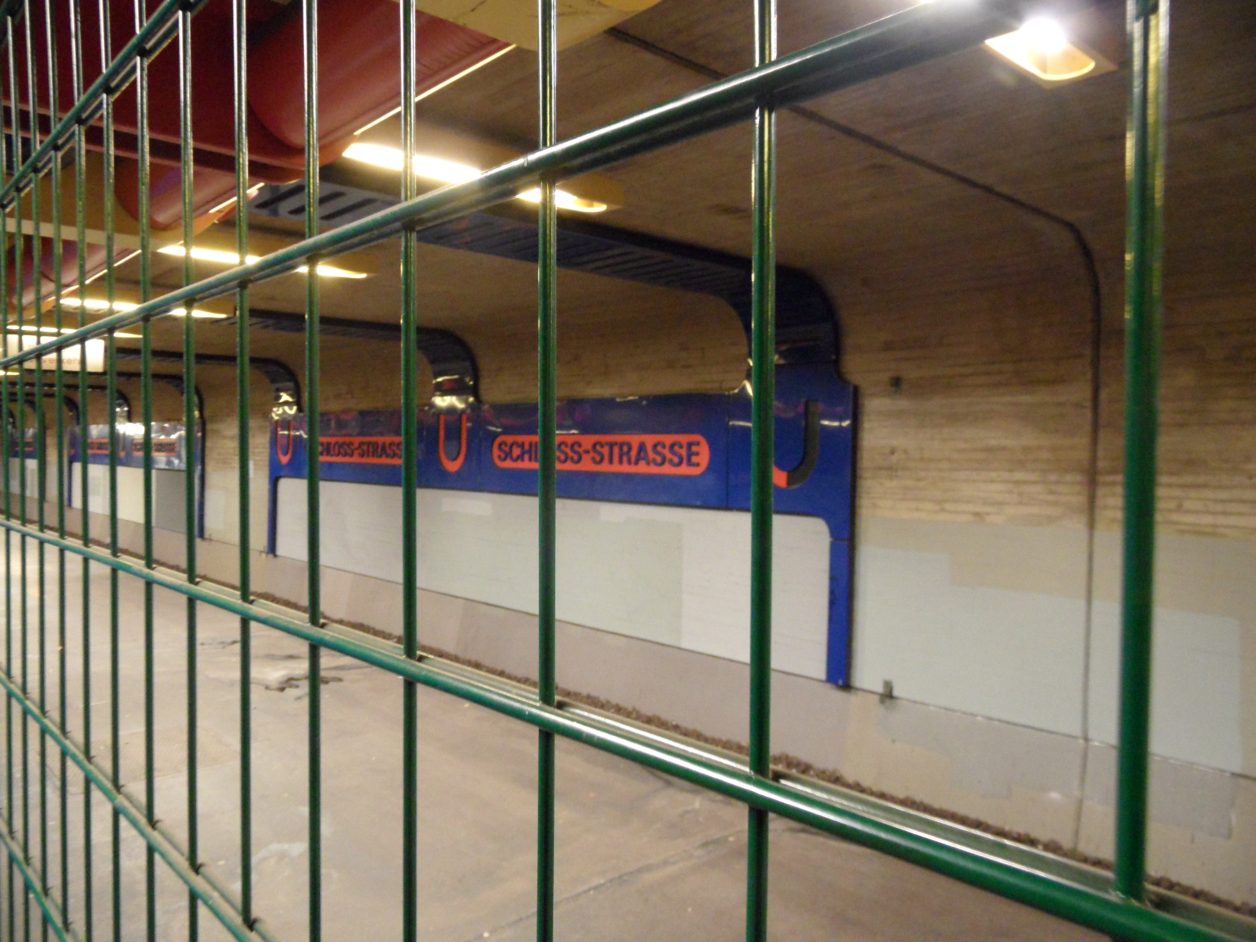 Berlin - U-Bahnhof Schloßstraße - Linie U9